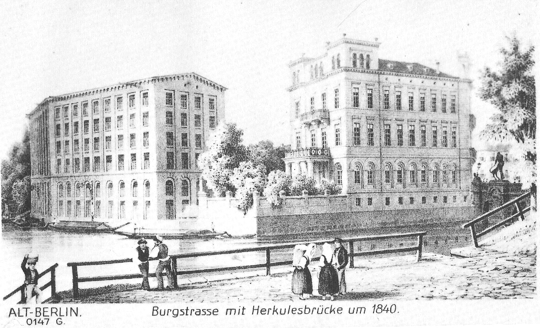 Ansicht des Aktienspeichers an der alten Herkulesbrücke in Berlin, 1840.